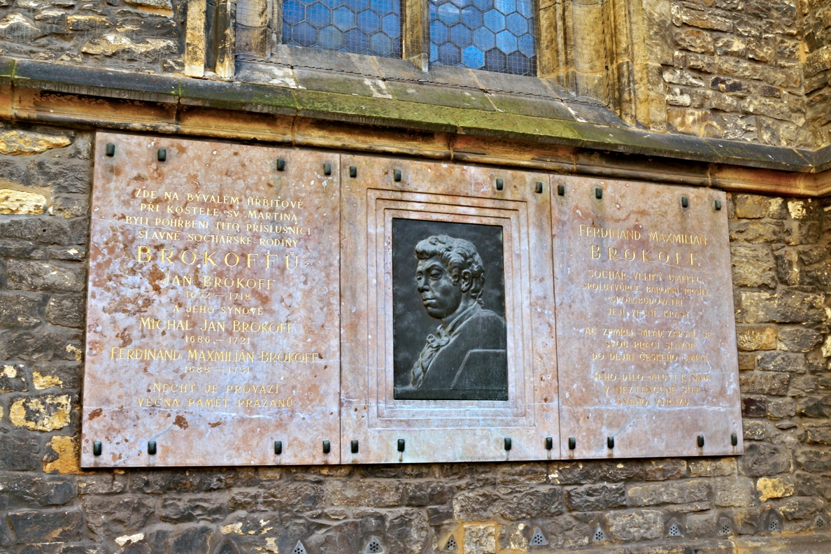 Praha 1-Staré Město, kostel sv. Martina ve zdi